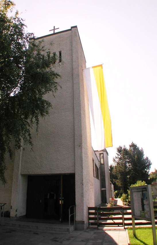 Sankt Theresia vom Kinde Jesu (Berlin)